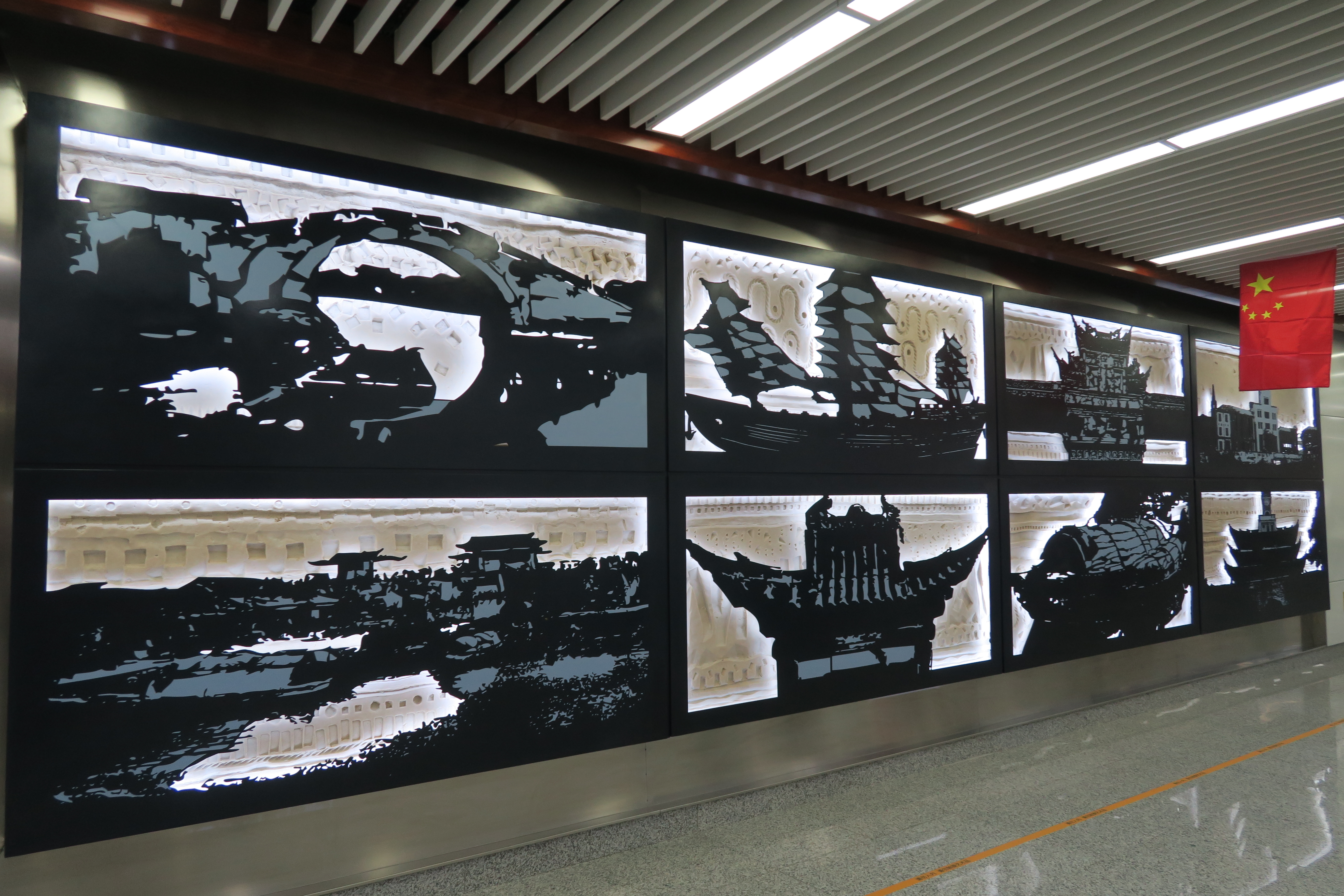 宁波轨道交通2号线外滩大桥站艺术墙“北岸笛韵”